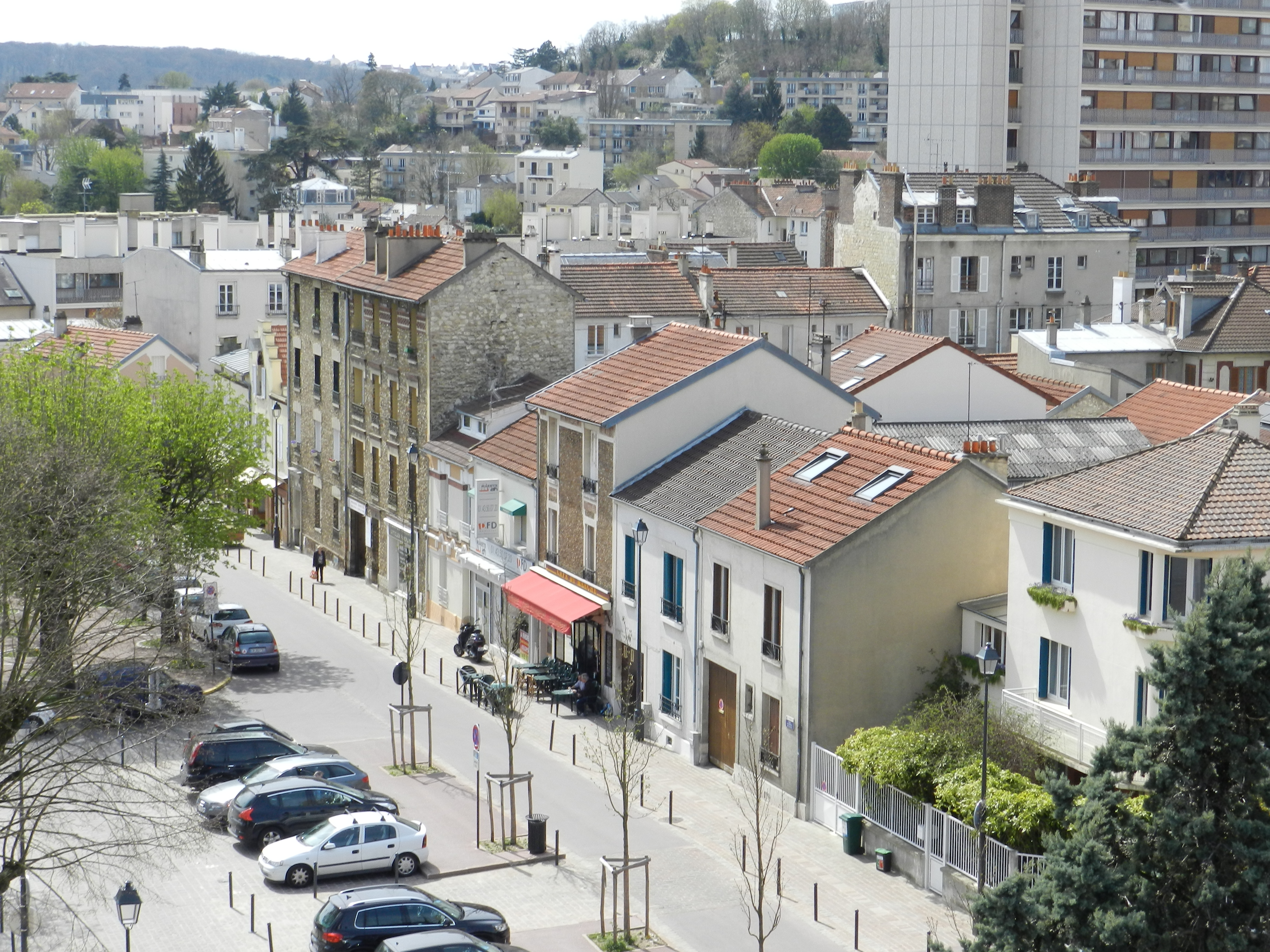 Une partie de la place Charles-de-Gaulle à Fontenay-aux-Roses.